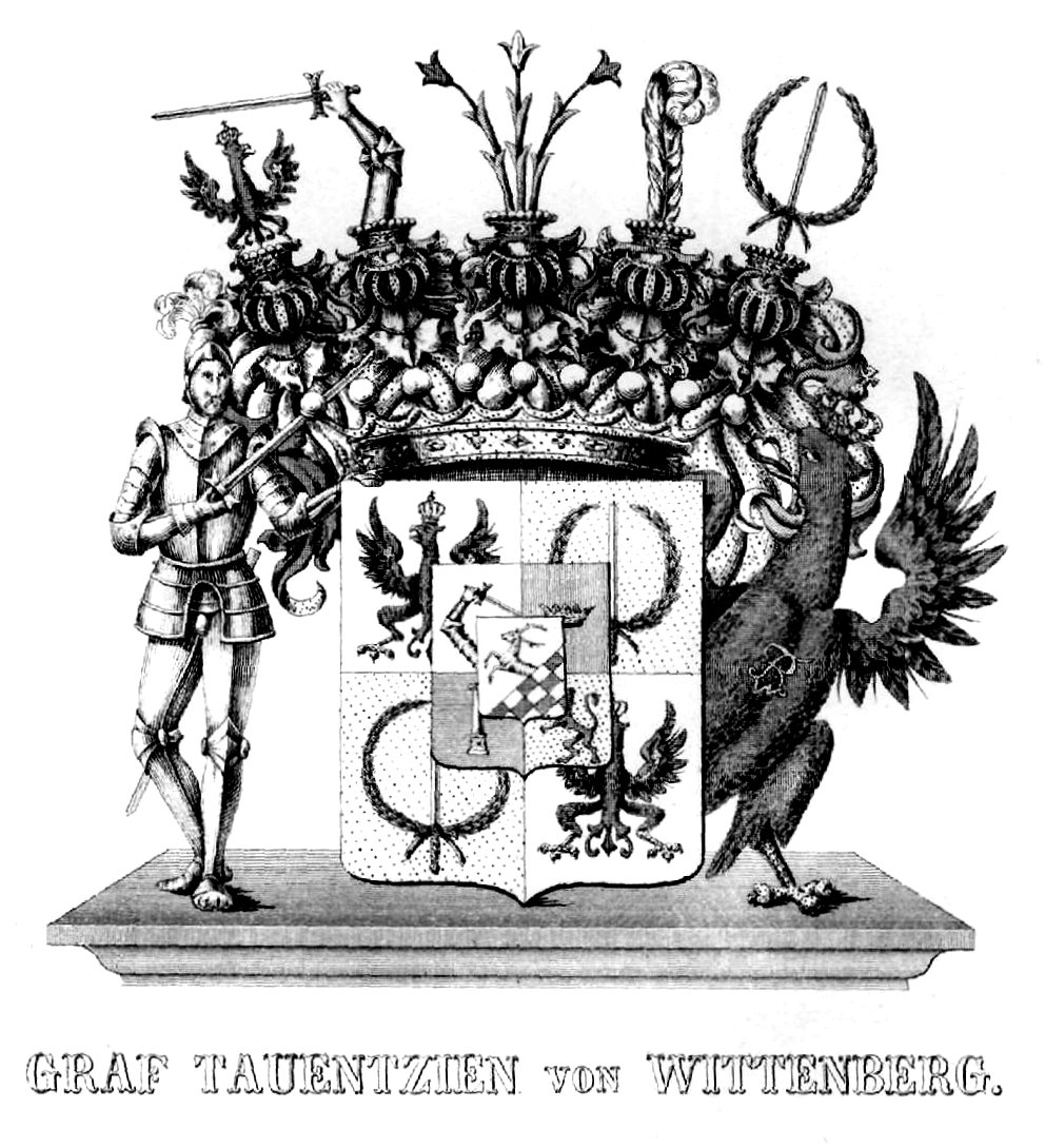 Wappen der Familie Grafen Tauentzien von Wittenberg.